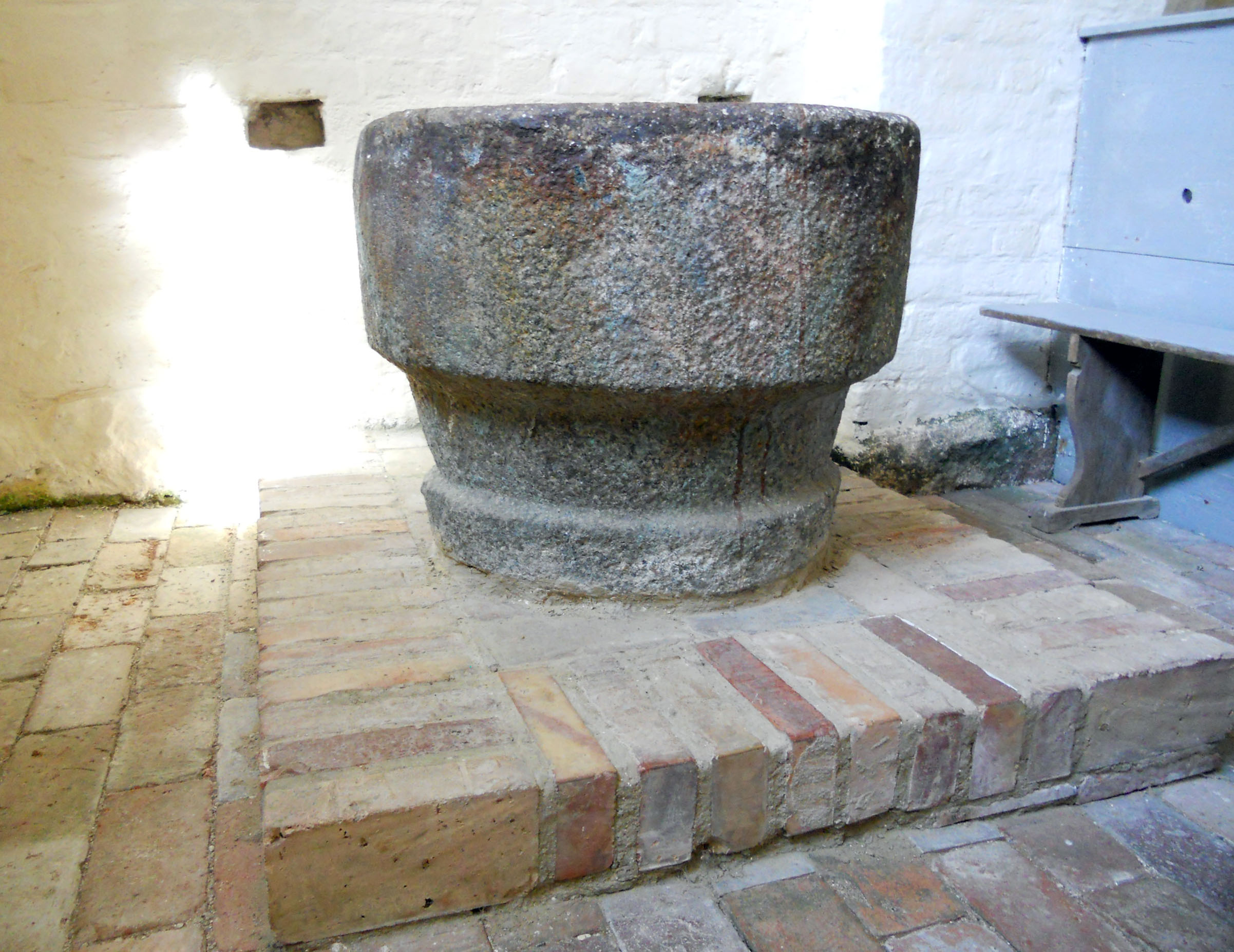 Alter Taufstein, ältestes Inventarstück der Kirche, St.-Katharinenkirche, Trent, Rügen